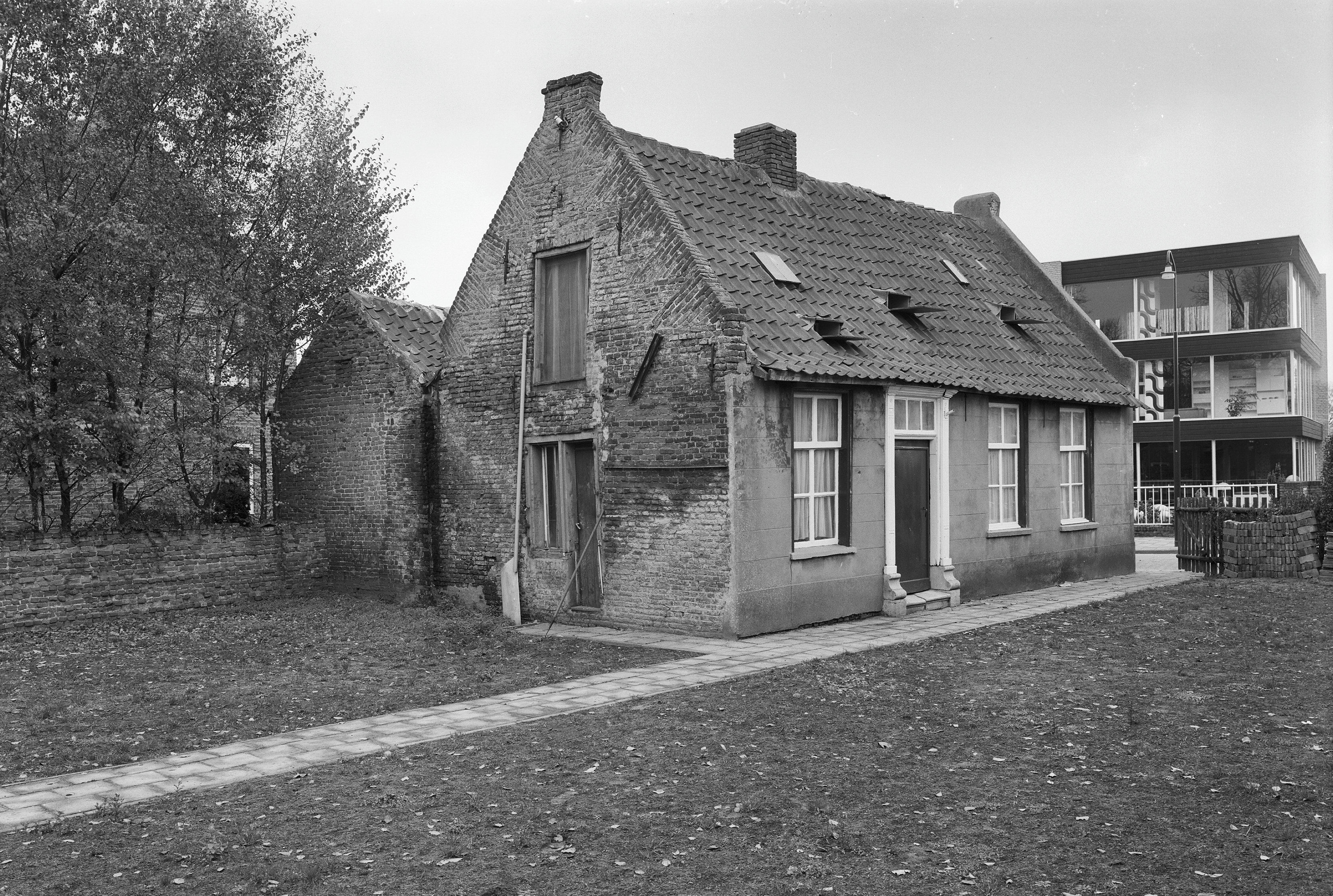 voor en linkerzijgevel